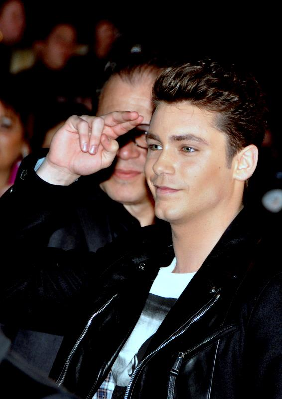 Bastian Baker aux NRJ Music Awards